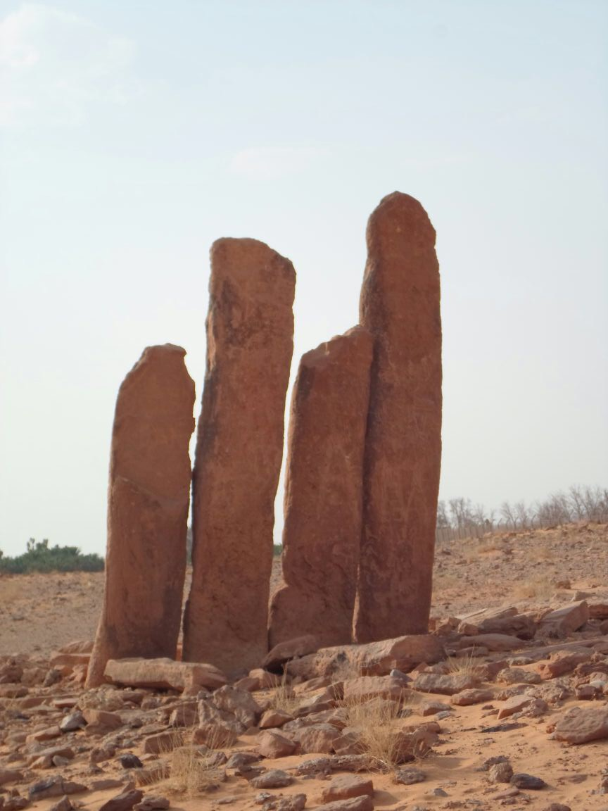 أعمدة الرجاجيل في منطقة الجوف